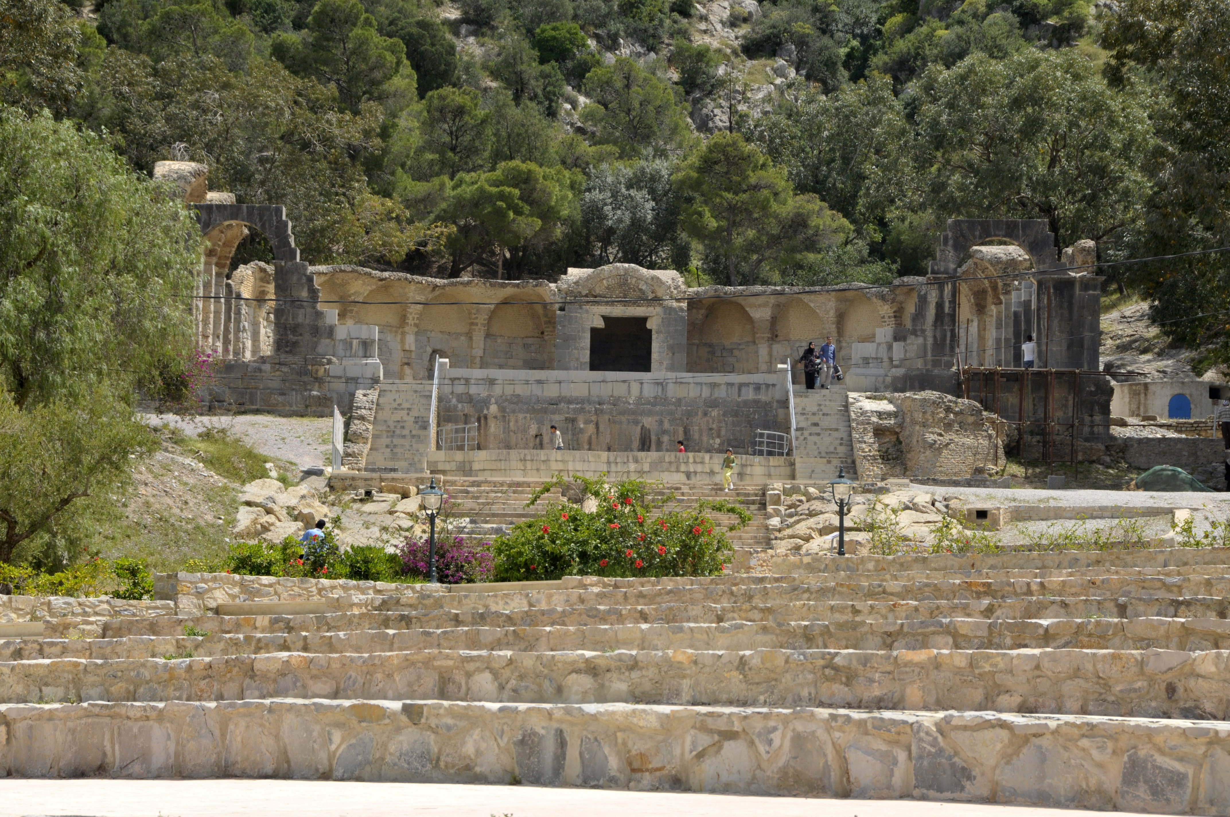 Temple des eaux de Zaghouan. C'est la que prend debut l'aquéduc d'eaux qui va à Tunis